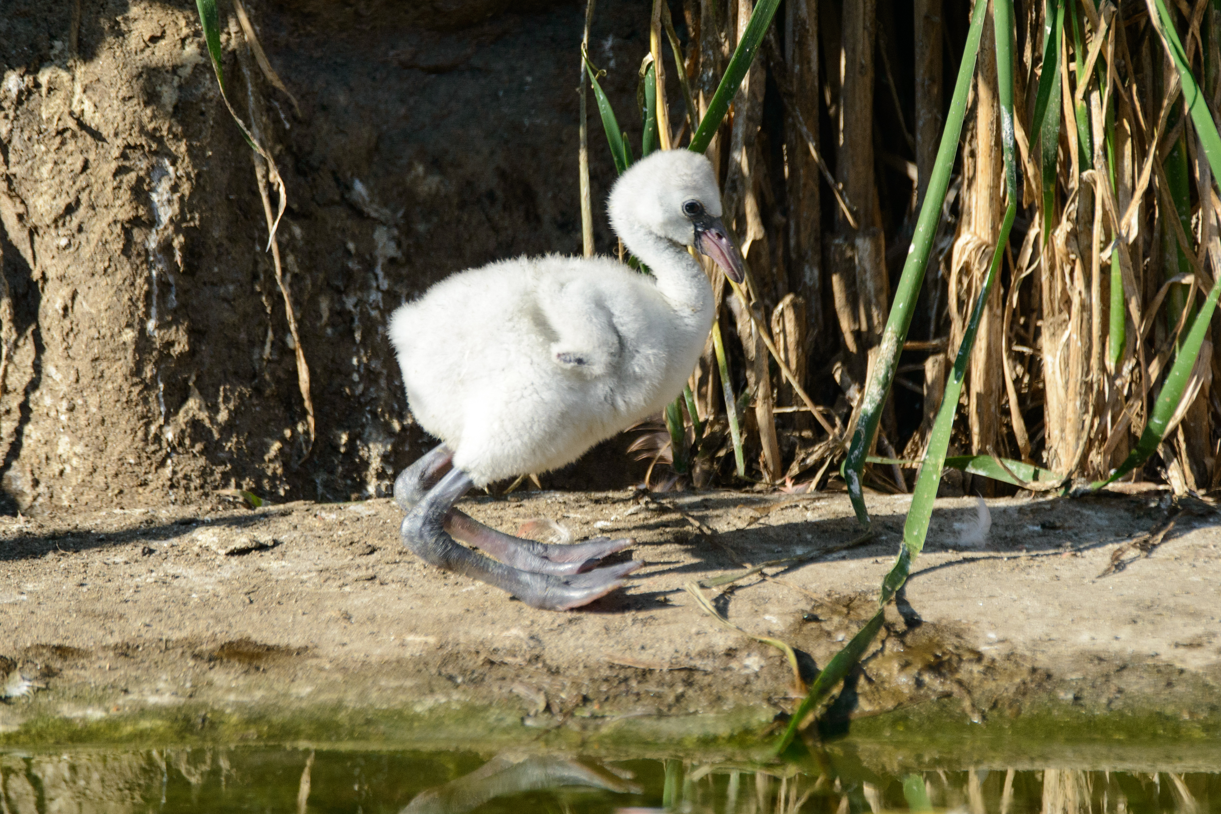 Baby Flamingo